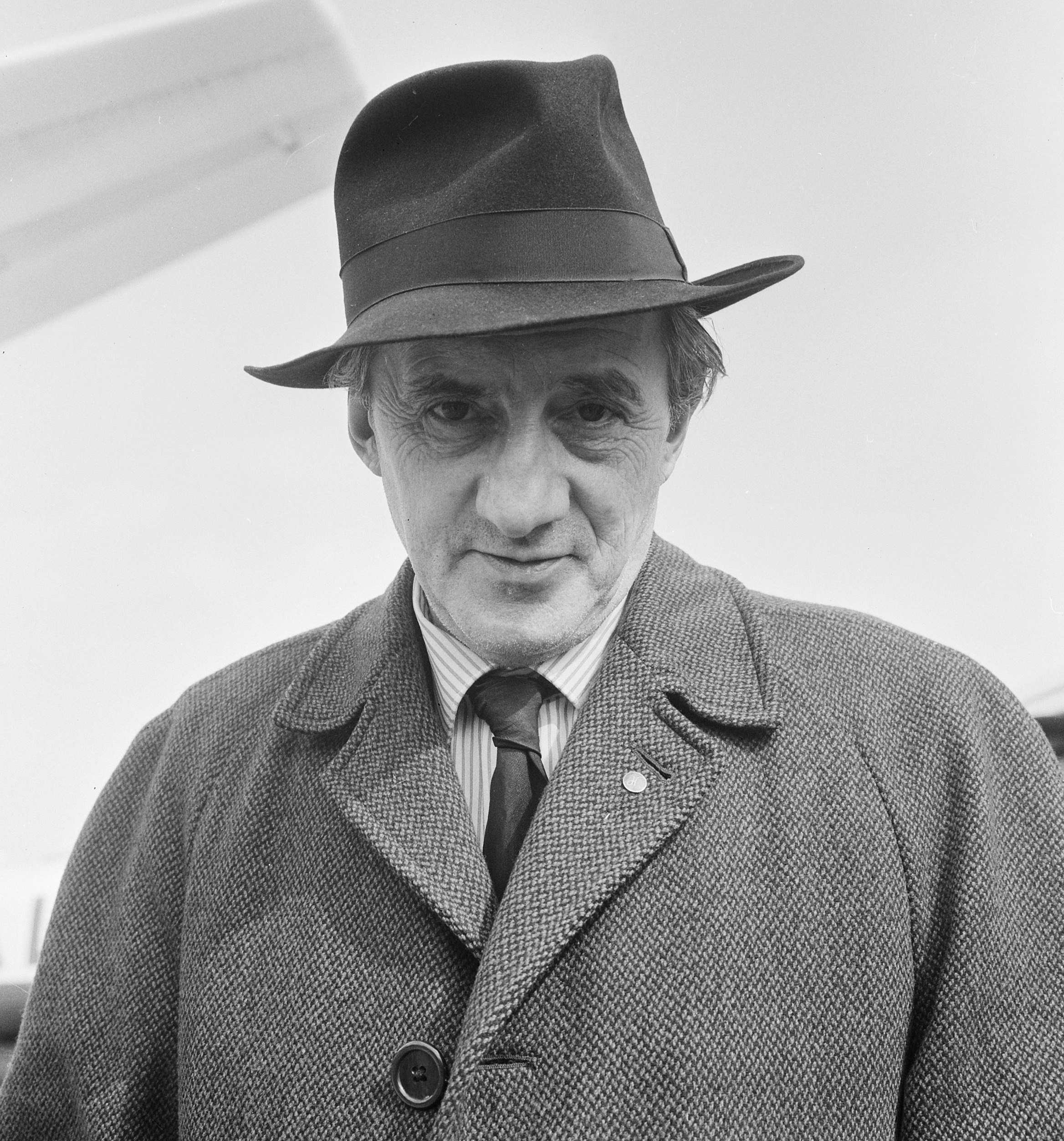 Aankomst Sir John Barbirolli (dirigent) op Schiphol